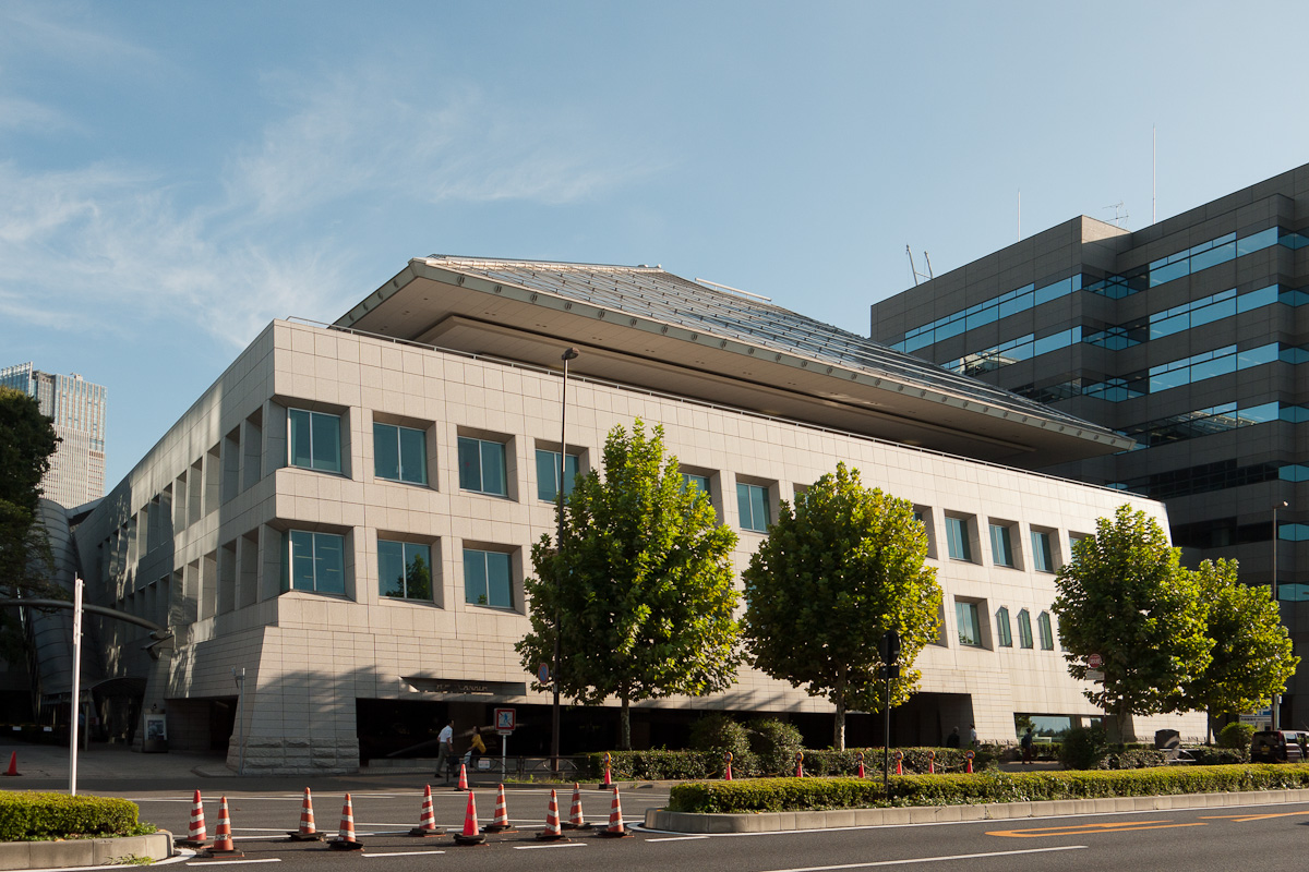 在日カナダ大使館、東京都港区赤坂7丁目。